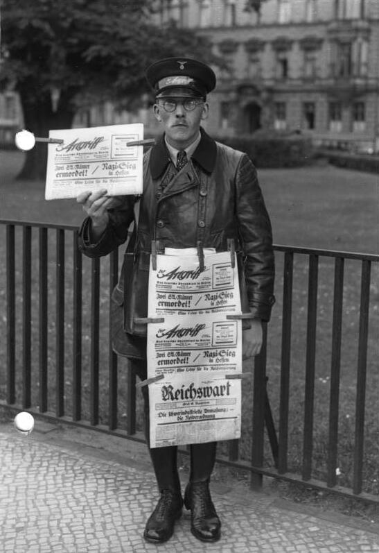 Pionier des Angiffs